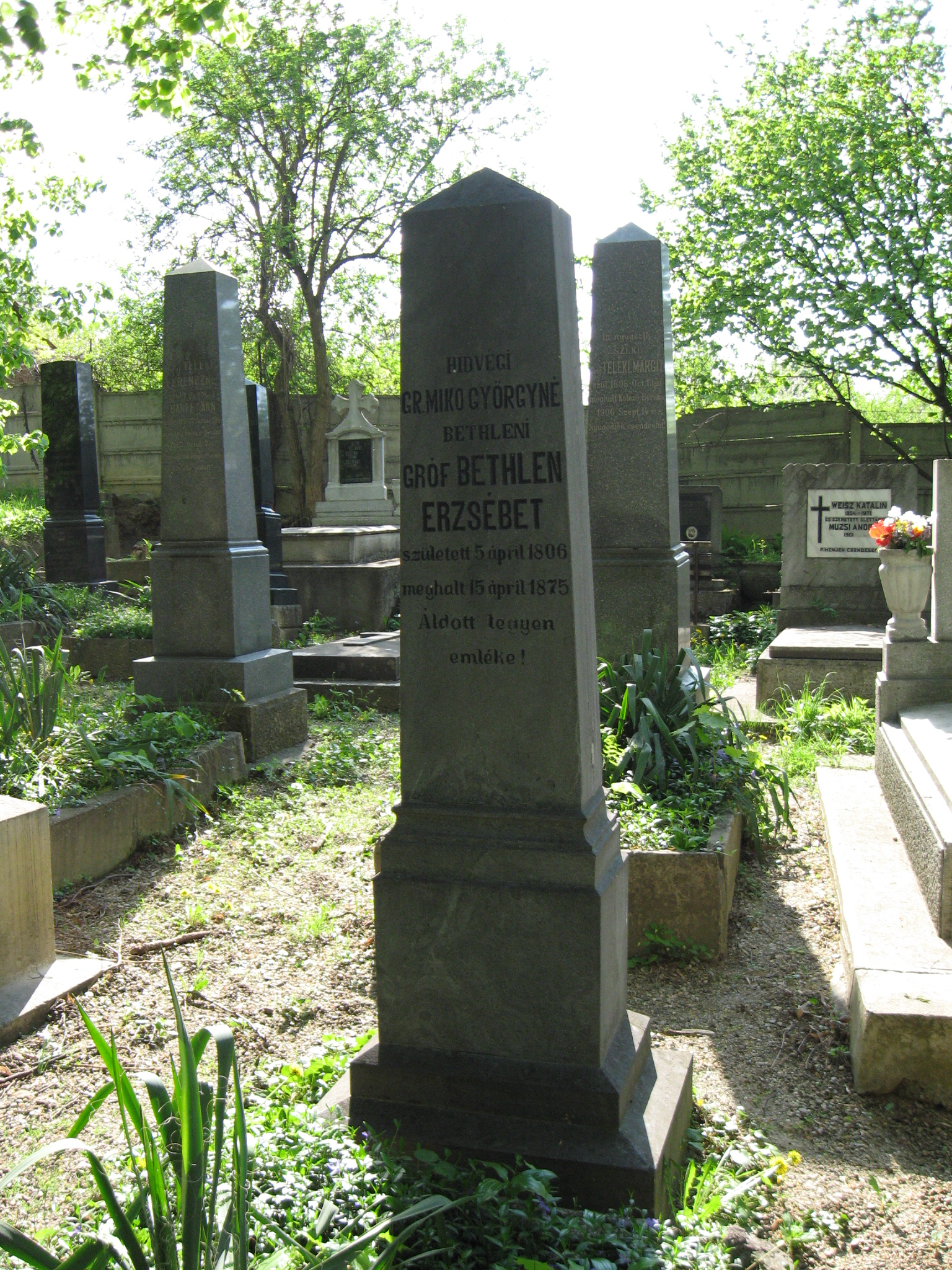 Gróf Bethlen Erzsébet sírja a kolozsvári Házsongárdi temetőben. 139